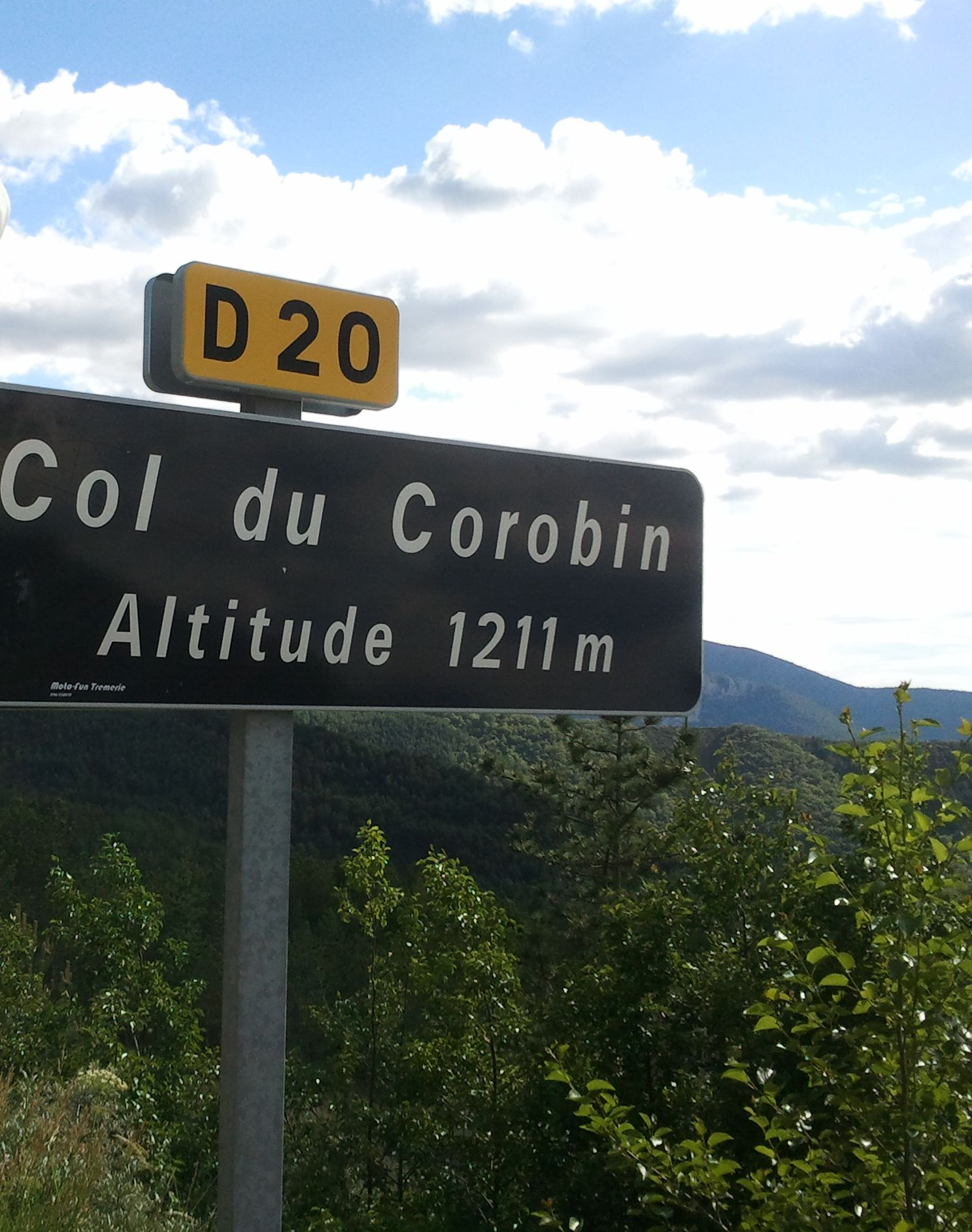 Panneau indiquant le sommet du col de Corobin